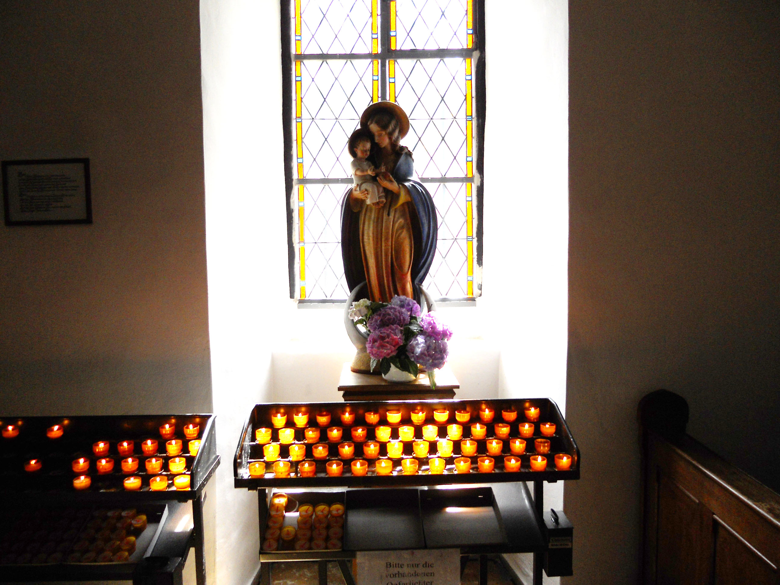 Propsteikirche Madonna hinter Opferkerzen